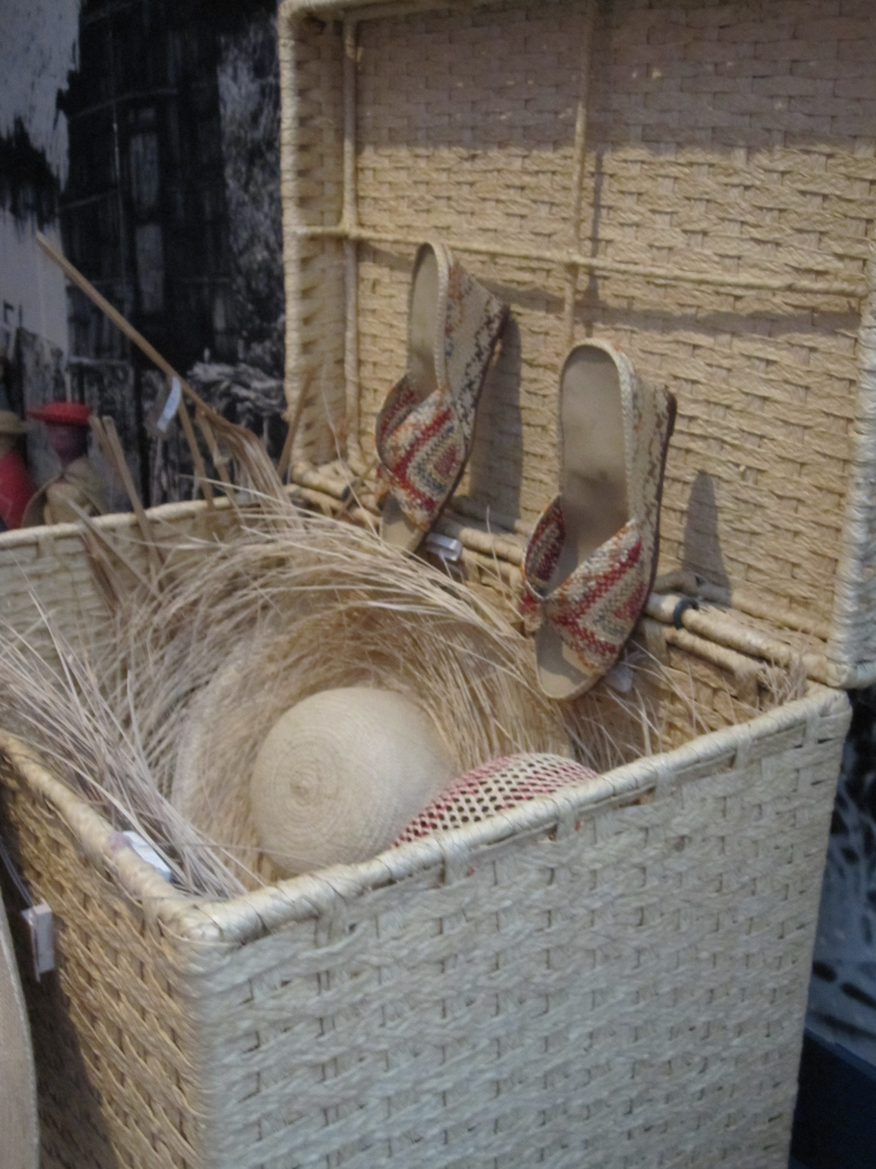 Montubio paja objects